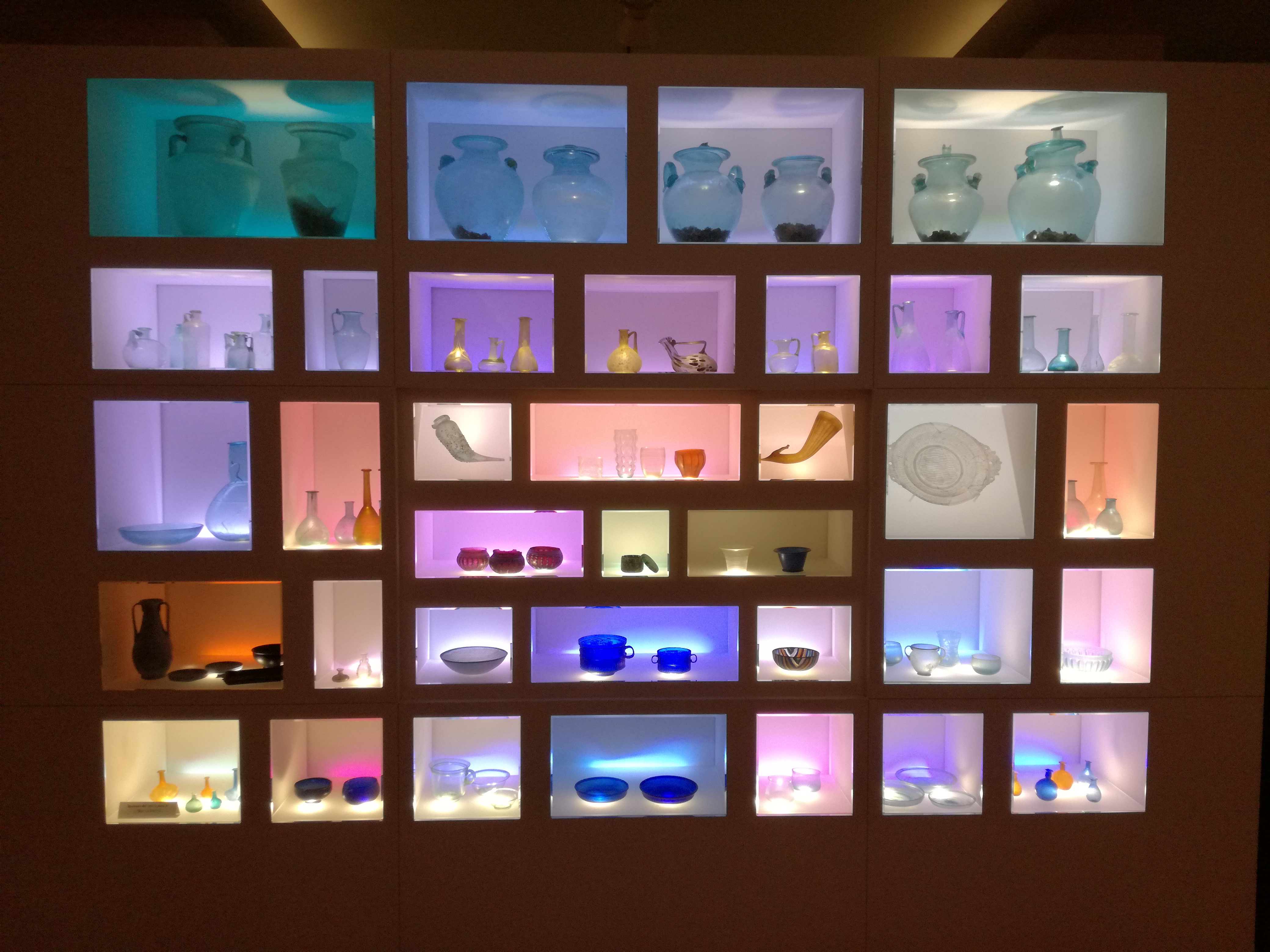 Reperti in vetro nella sezione romana del Museo Archeologico Nazionale di Adria.